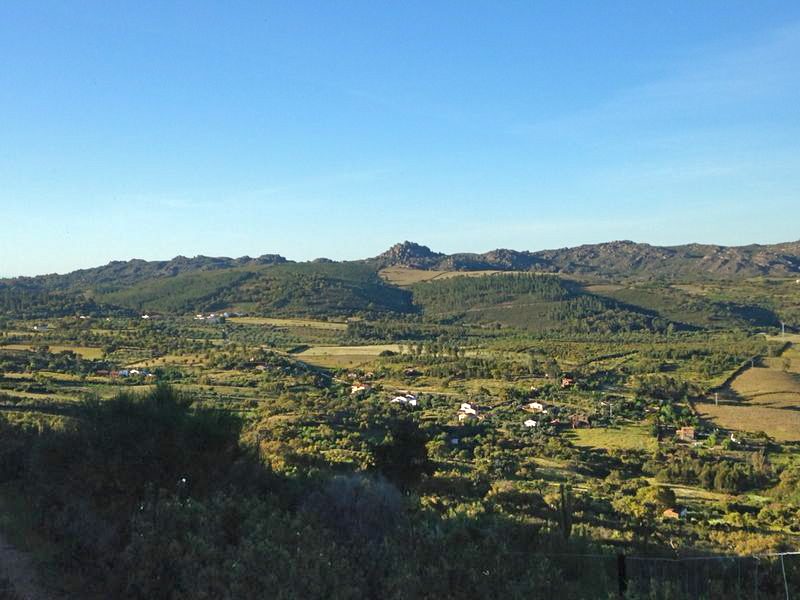 Paisaje en Aceña de la Borrega (municipio de Valencia de Alcántara, provincia de Cáceres, España), vistas desde la Portilla de Giniebro.